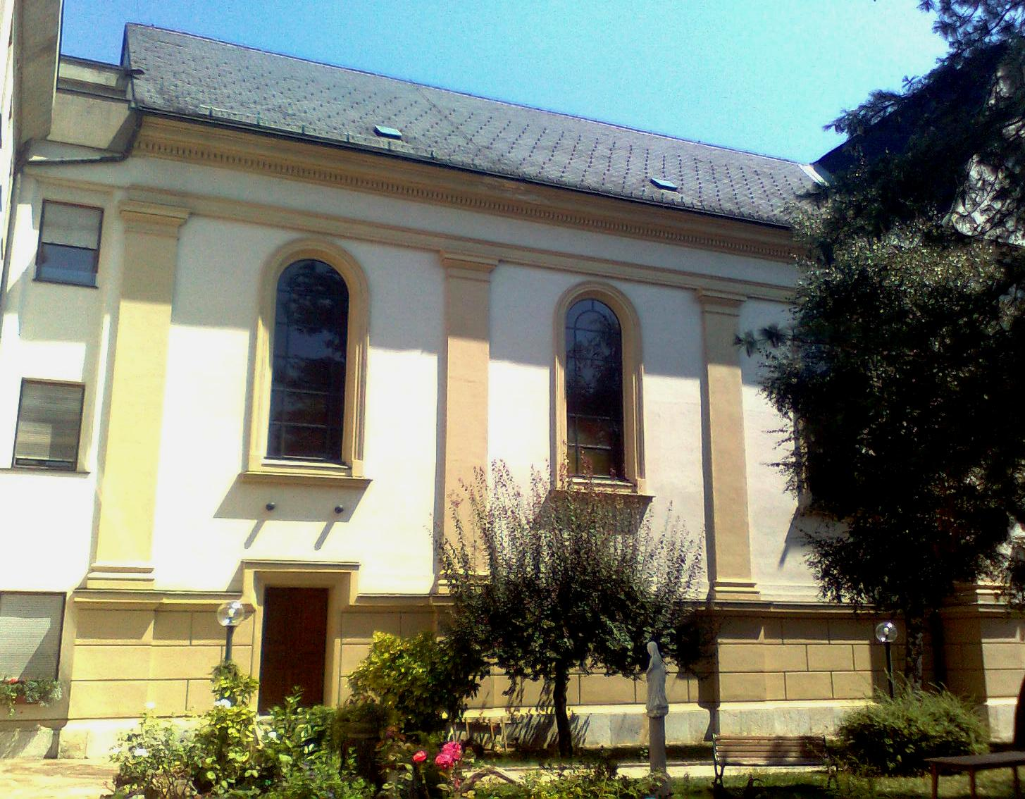 Seiten Fassade der Schulschwesternkirche in Graz-Eggenberg